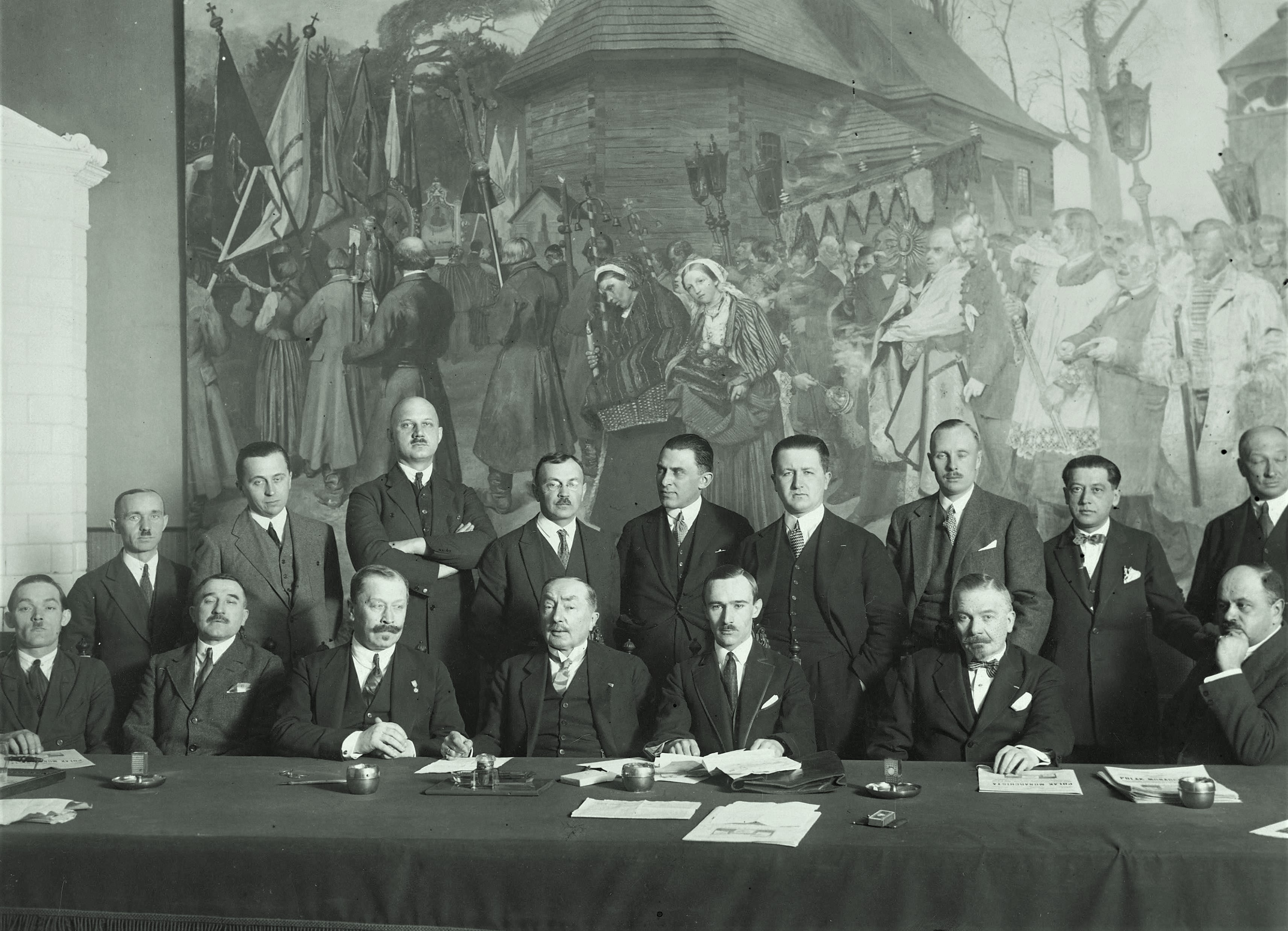 Uczestnicy obrad. Widoczni m.in.: gen. broni Kazimierz Raszewski (siedzi 4 z lewej), prezes Obiezierski (siedzi 3 z lewej), prezes okręgu warszawskiego Mrozowski (siedzi 2 z prawej), sekretarz generalny J. Robakowski (3 z prawej), naczelny dyrektor Teofil Orzechowski.